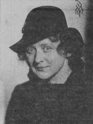 Arkitekten Ingeborg Wærn Bugge